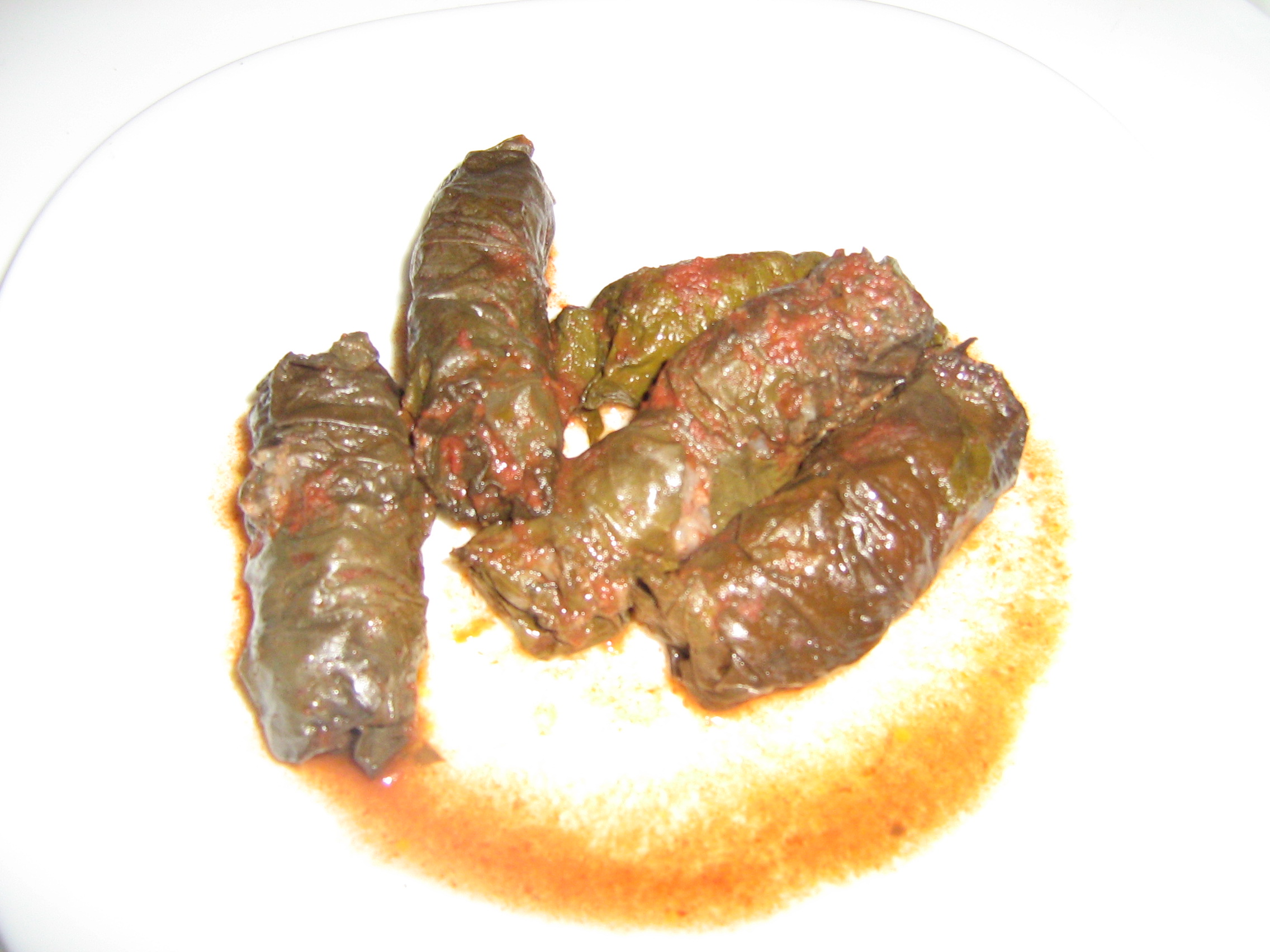 Sarmale în frunze de viță